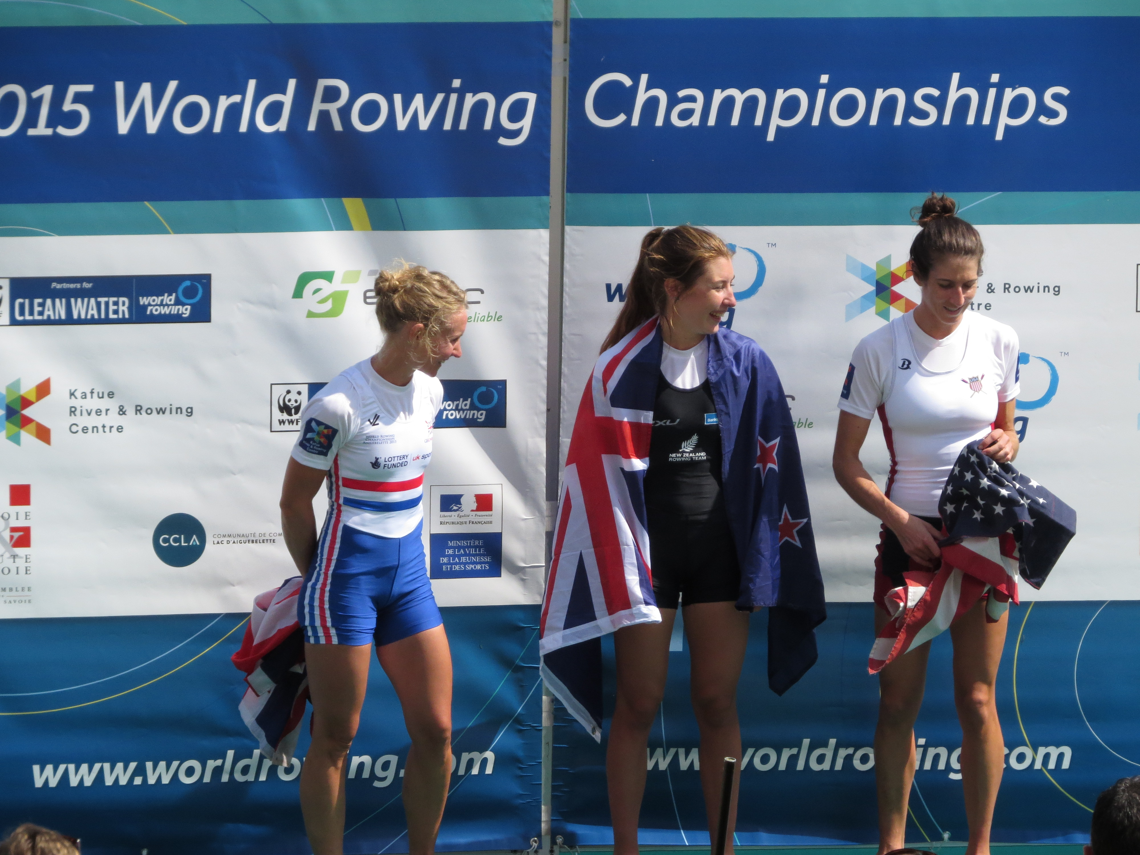 Podium LW1x NZL : MCBRIDE, Zoe GBR : WALSH, Imogen USA : BERTKO, Kathleen